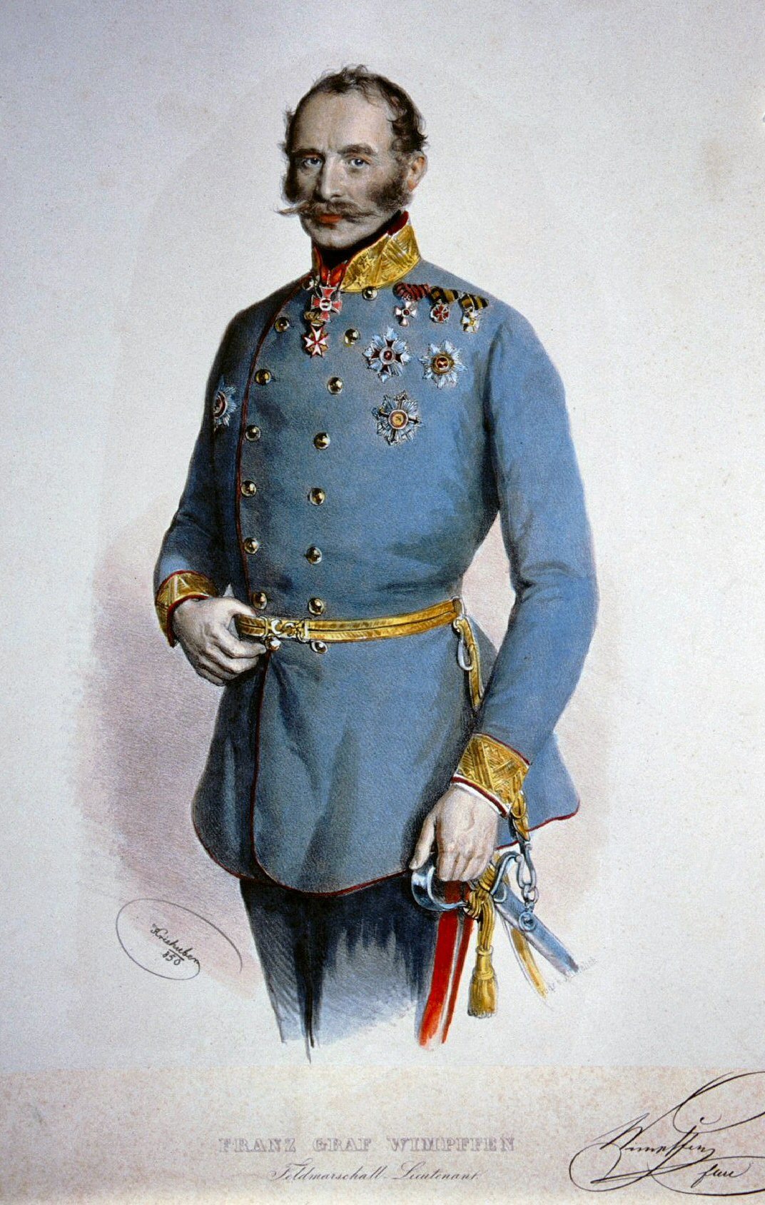 Franz Graf Wimpffen, kolorierte Lithographie von Josef Kriehuber, 1850